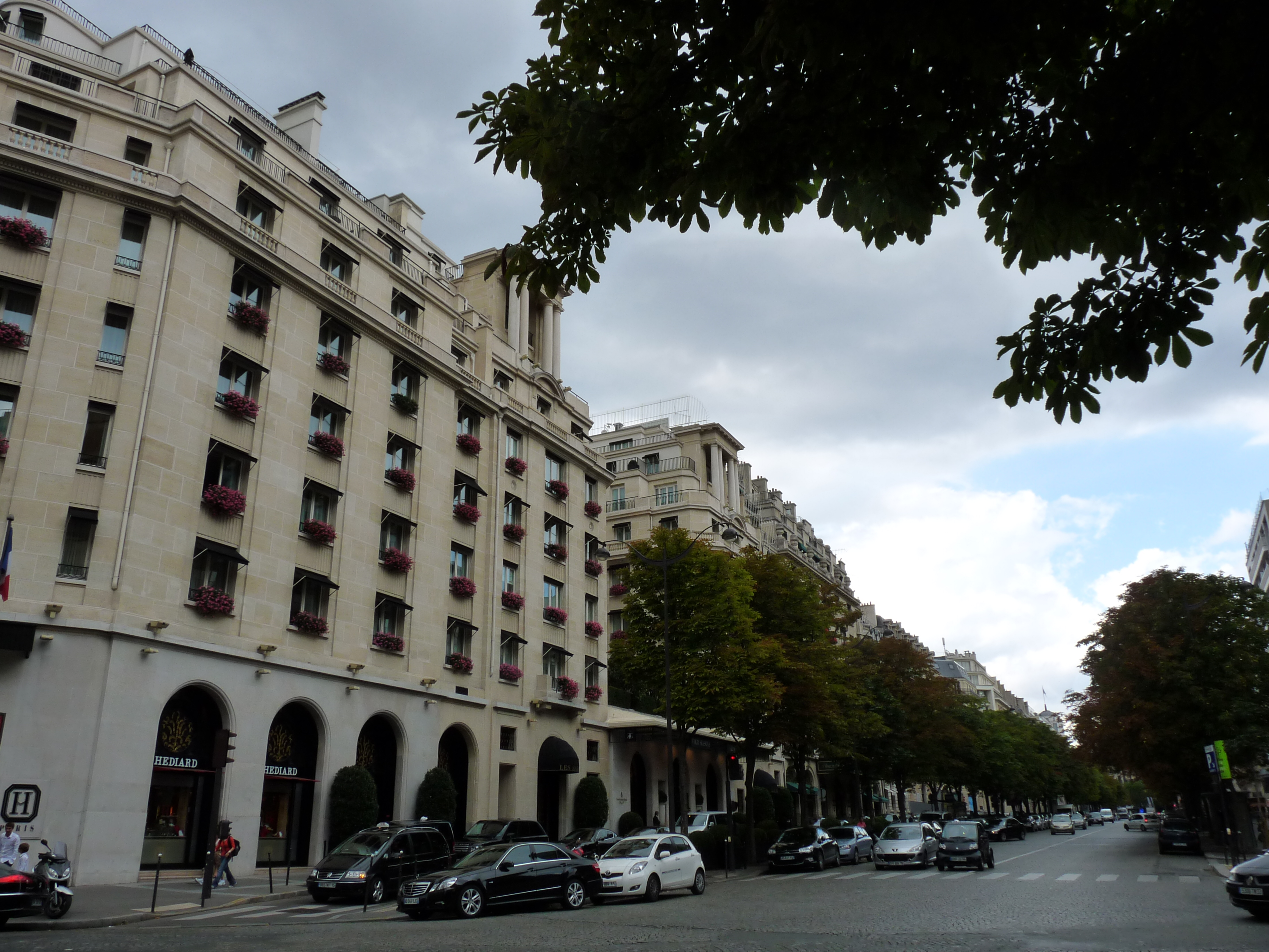 L'avenue Georges-V à Paris, l'hotel Georges-V